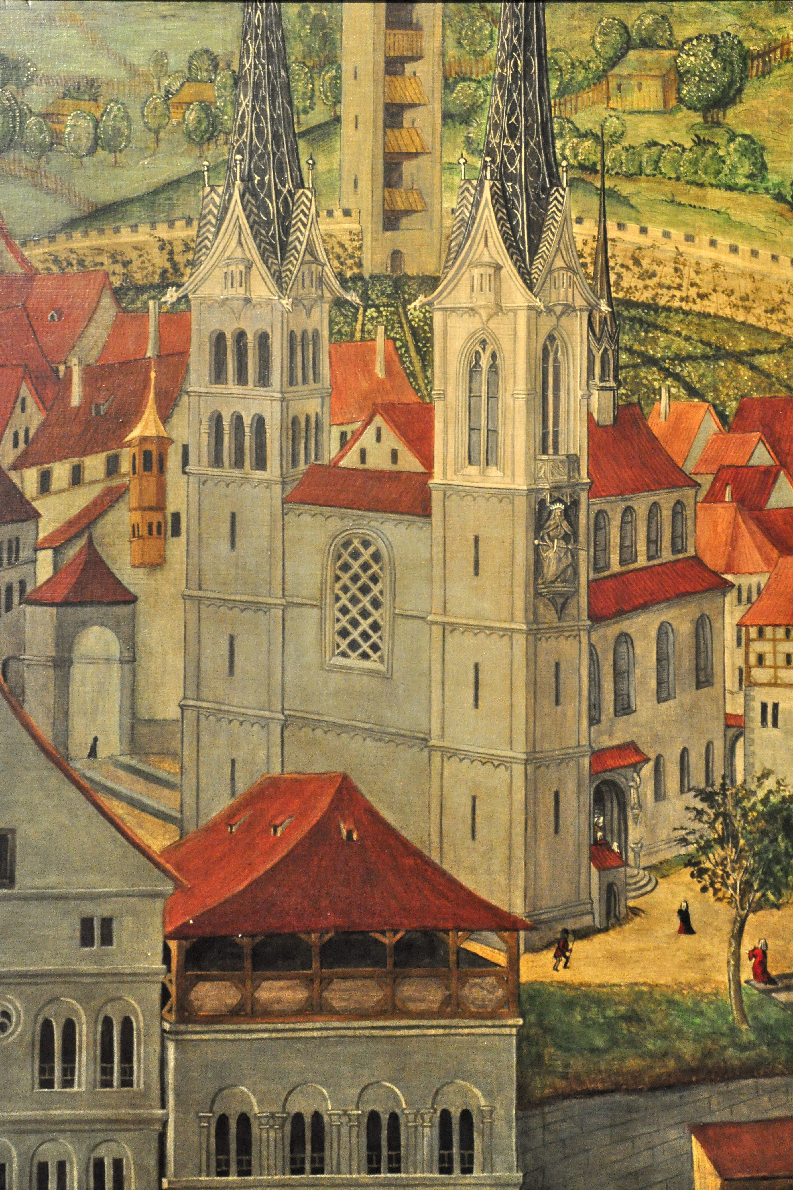 Das Grossmünster und das Zunfthaus zur Zimmerleuten auf der Replik der Altartafeln von Hans Leu im Baugeschichtlichen Archiv der Stadt Zürich im Haus zum Rech. Die Panoramansicht des rechtsseiten Limmatufers – 'Standort' der BetrachterIn ist wohl der Turm von St. Peter – von Hans Leu d. Ä. gilt als die älteste zuverlässige Darstellung der Stadt Zürich, Ende des 15. Jahrhunderts auf den Altartafeln im Grossmünster mit viel Liebe zum Detail festgehalten. Die originalen Tafeln sind heute im Landesmuseum ausgestellt, eine (vermutlich) 1:1 Replik ist im Stadtarchiv öffentlich zugänglich.